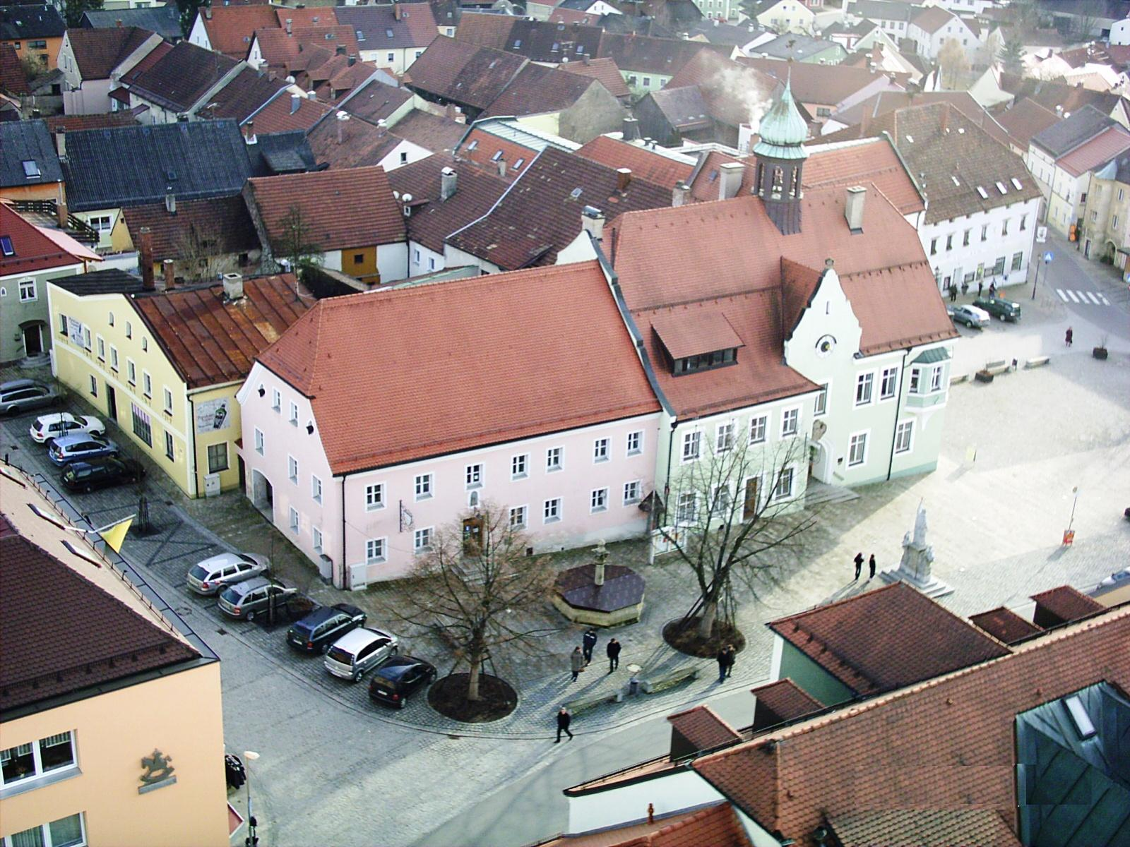 Im Bild vorne links (rosa Haus) das ehemalige Stadler-Haus, das Teil des Rathauses mit Touristen-Info ist. Rechts daneben das ursprüngliche Rathaus.